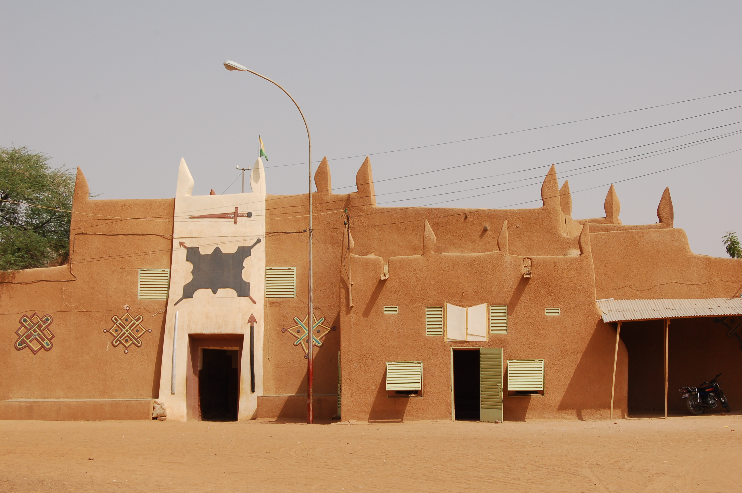 Palais du sultan à Zinder, sultan's palace in Zinder